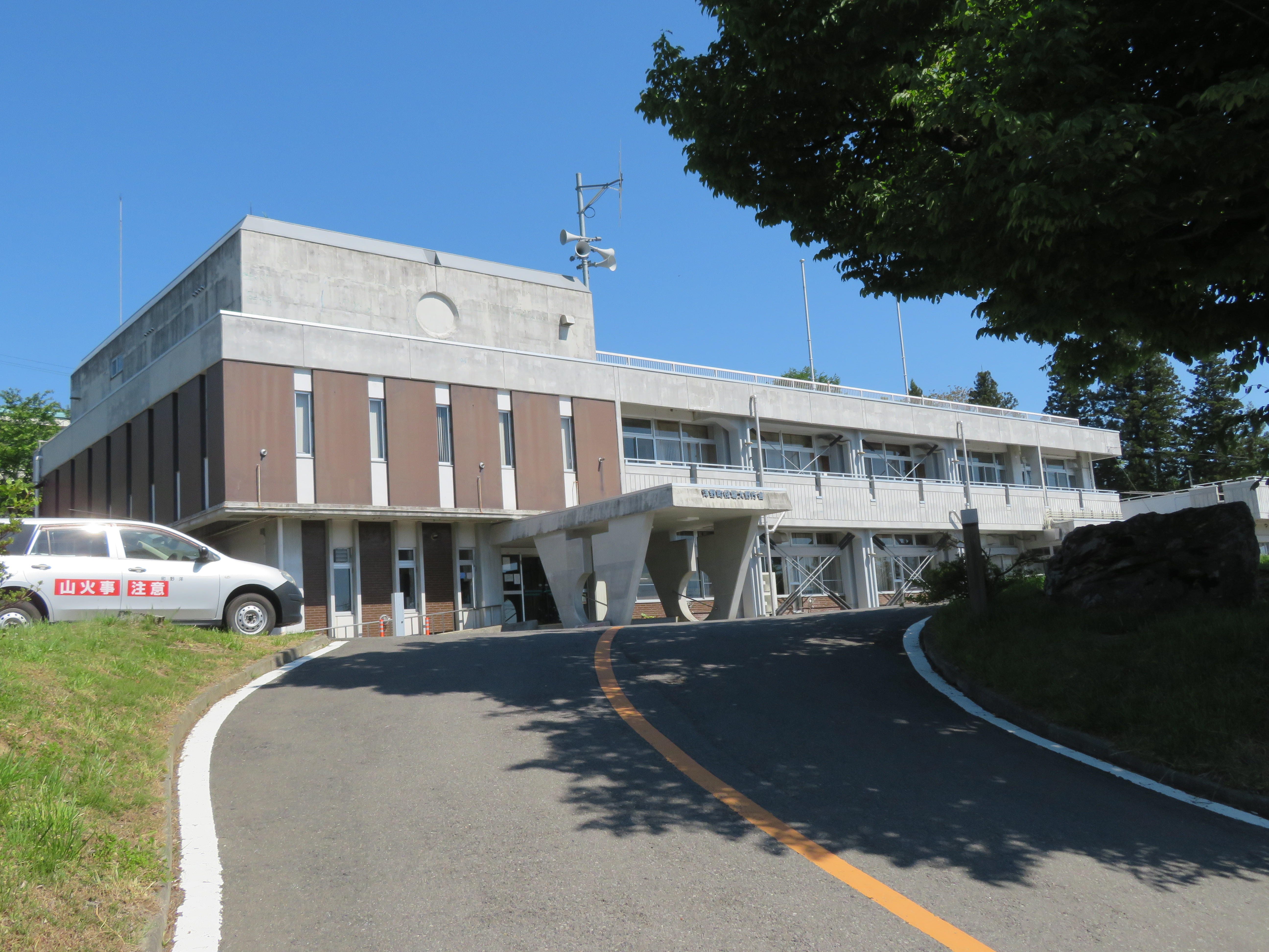 岩手県九戸郡洋野町に所在する洋野町役場大野庁舎（旧大野村役場庁舎） Canon PowerShot SX720 HS